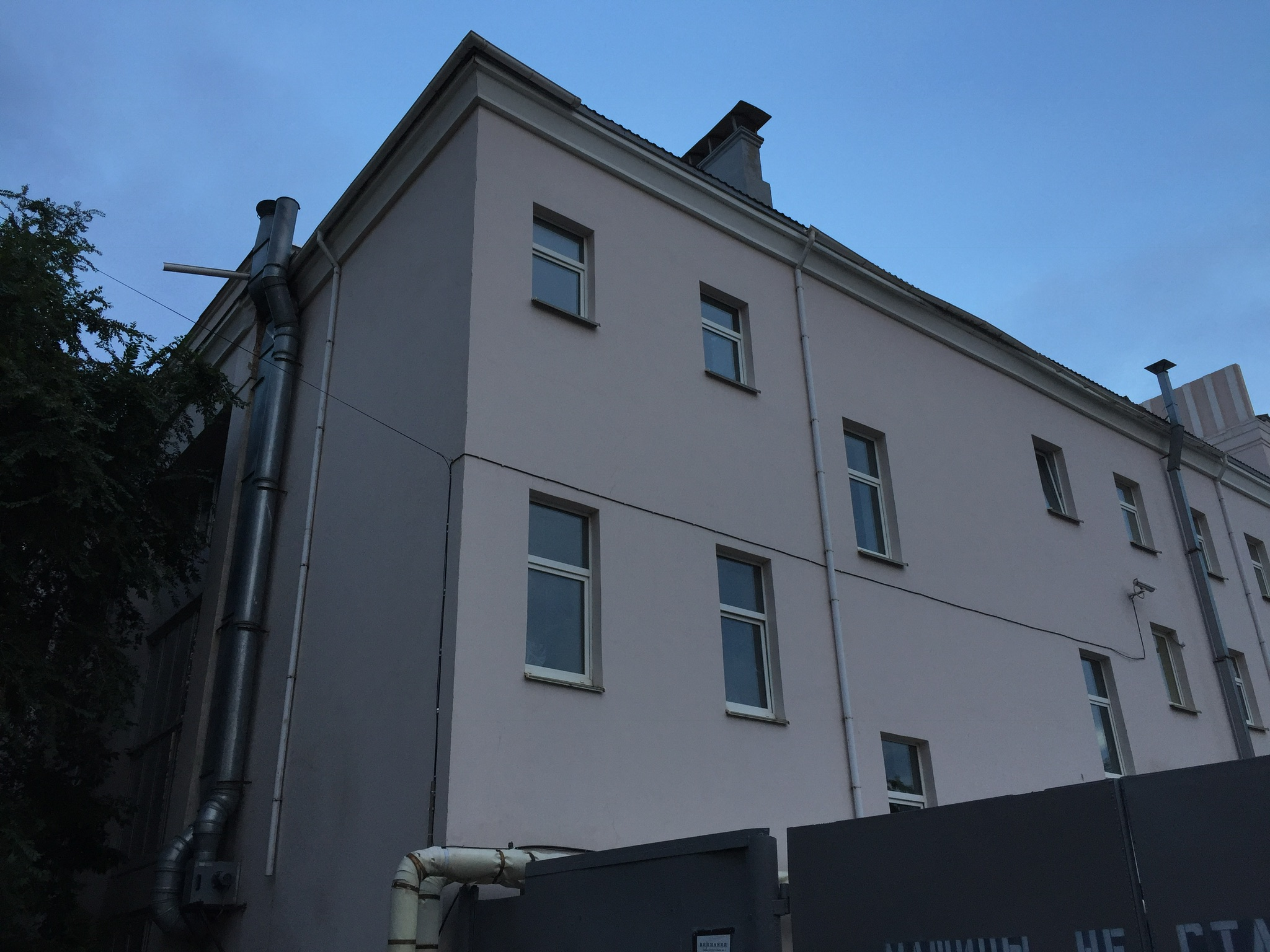 Астраханский ТЮЗ, вид со двора